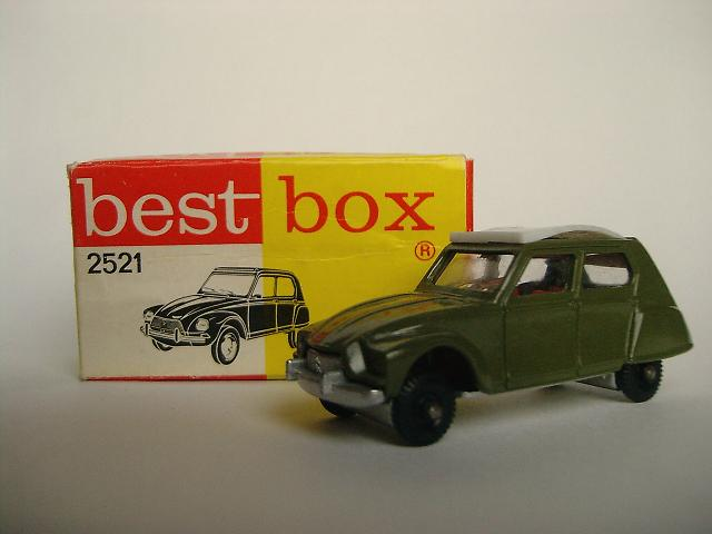 Best box No 2512 Citroen Dyane. Eigen foto.